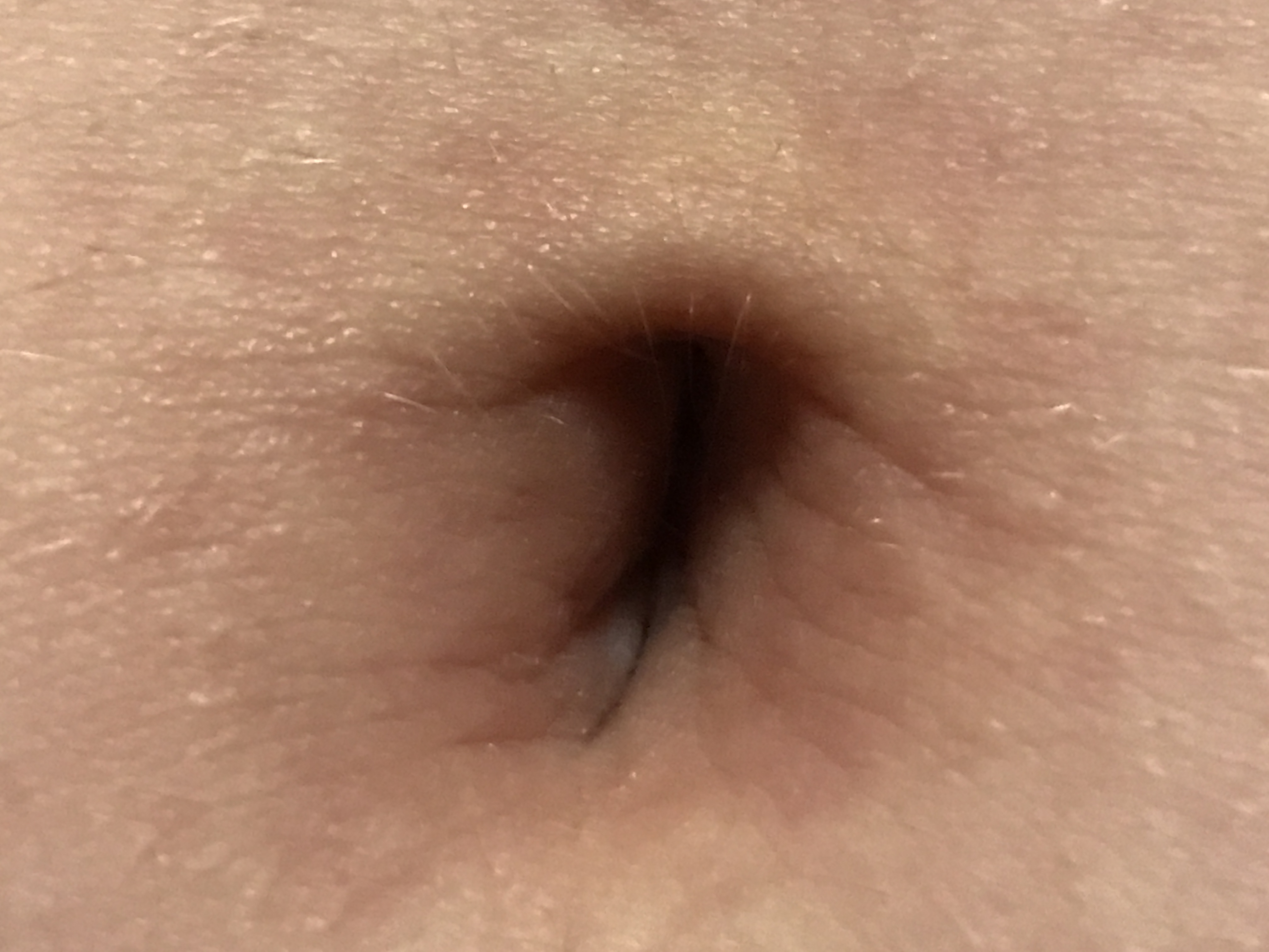 Глубокий пупок человека